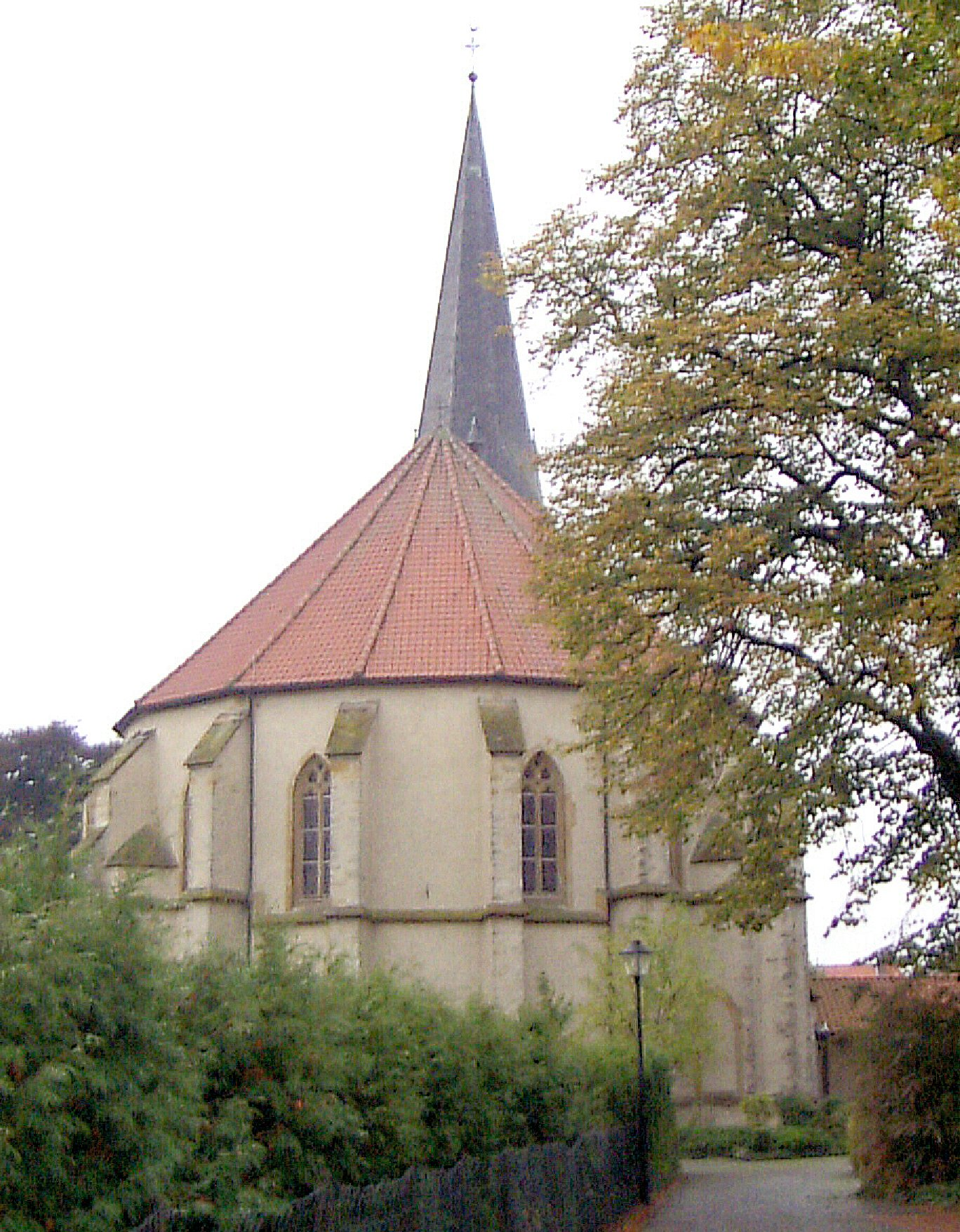 katholische Kirche in Sassenberg-Füchtorf